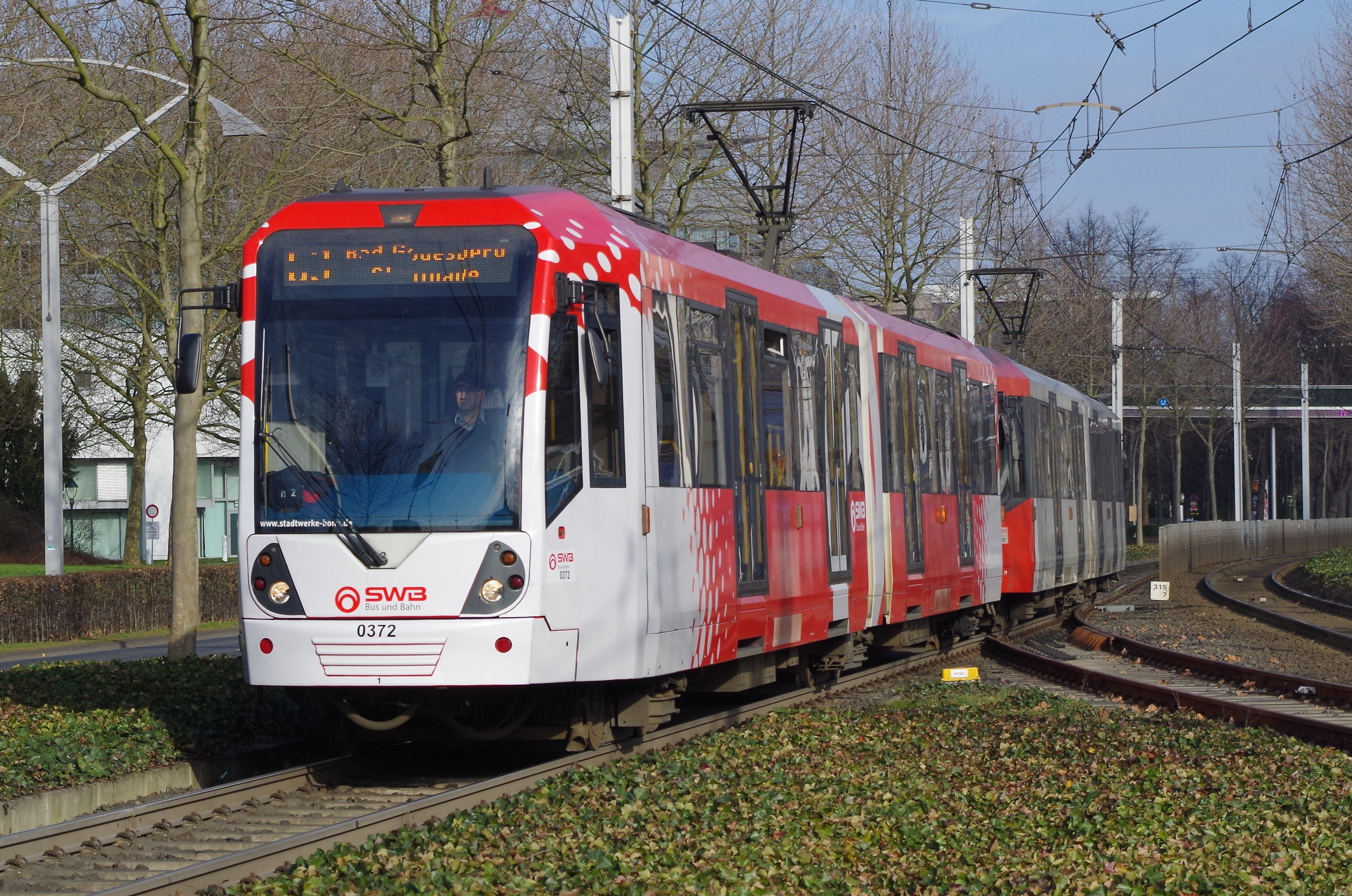 Ein K5000 der Stadtwerke Bonn in Unternehmensfarben